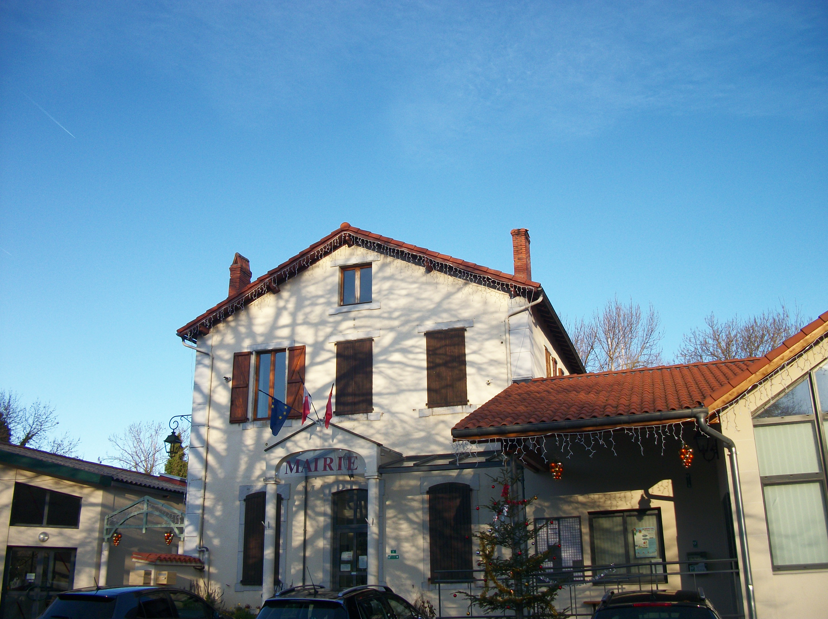 La mairie